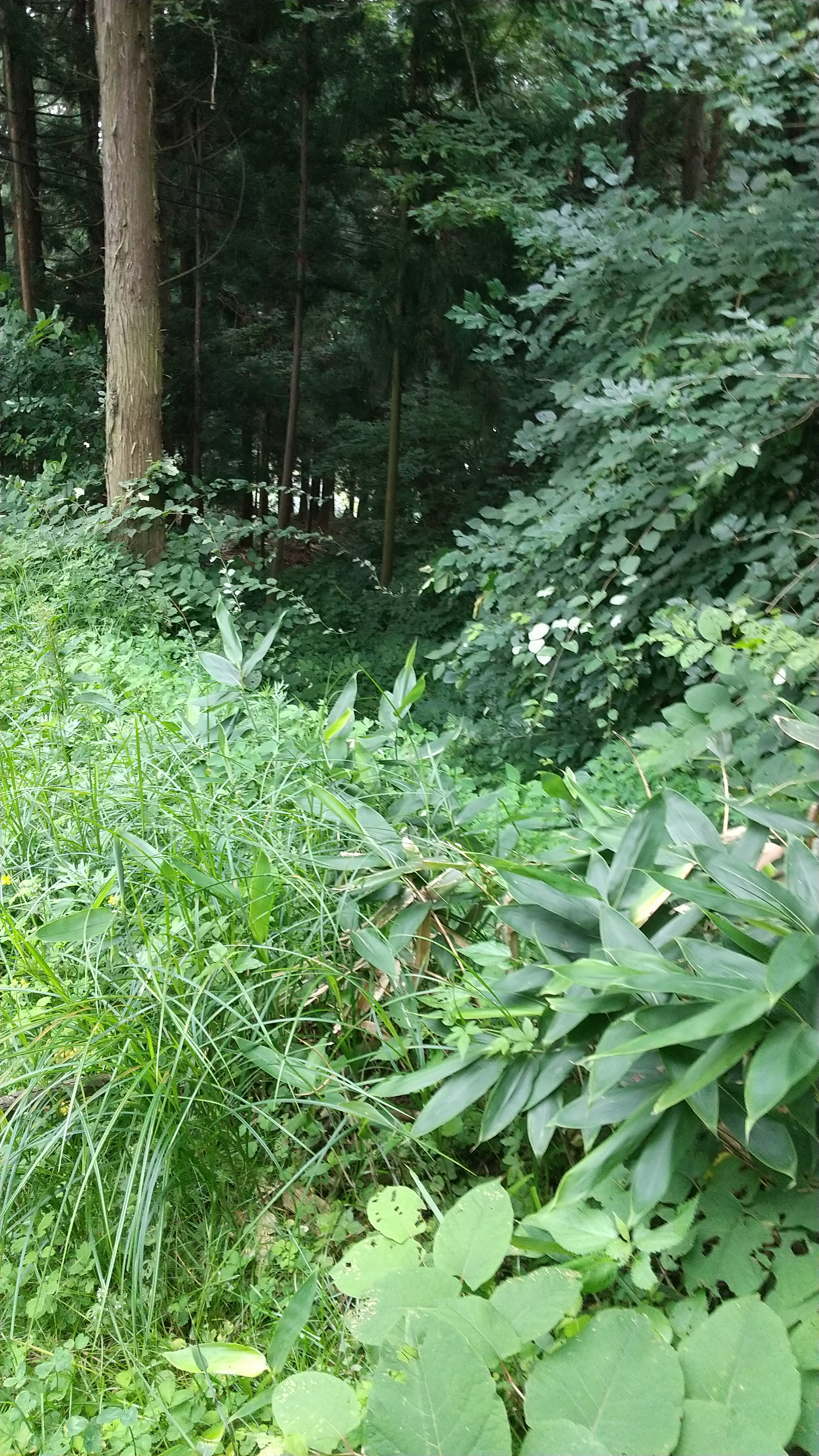 晴山館址 堀址